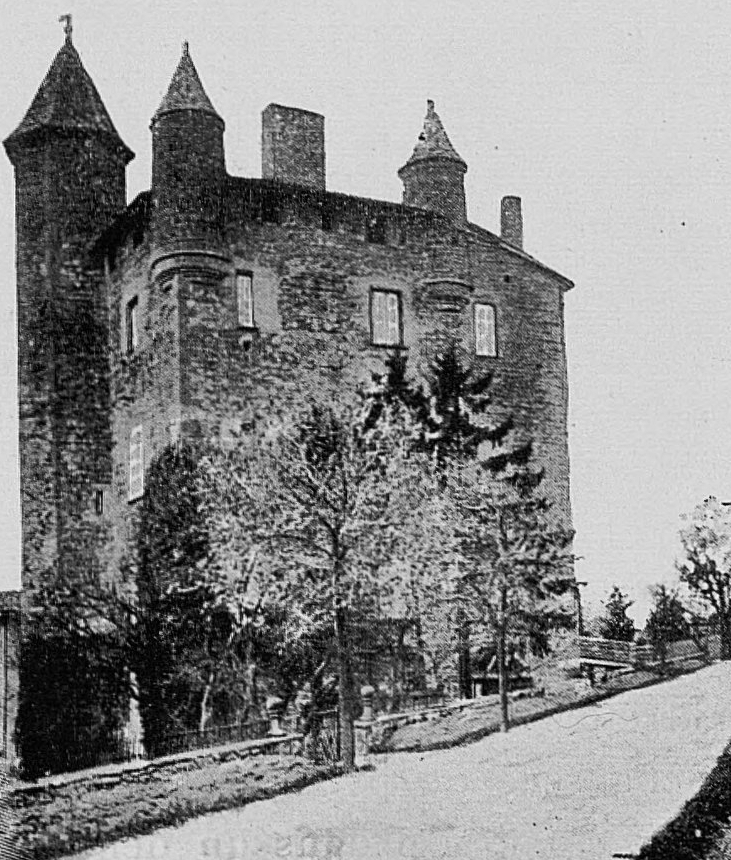 Dictionnaire illustré des communes du département du Rhône. Tome 1 / par MM. E. de Rolland et D. Clouzet.